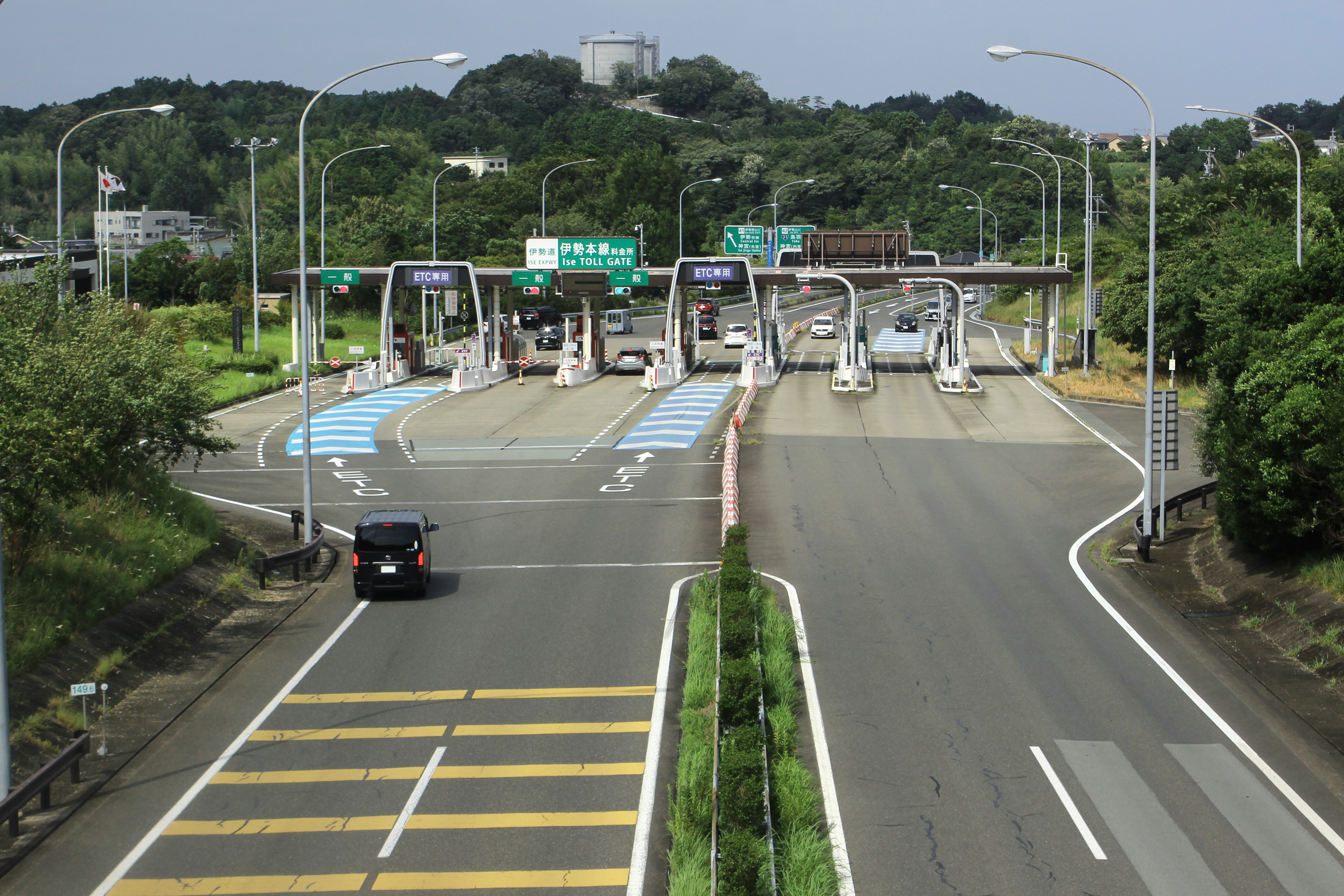 E23伊勢自動車道 伊勢本線料金所